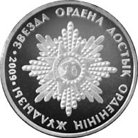 Памятная монета Республики Казахстан «Орден Достык» из серии «Награды Казахстана» - 50 тенге - реверс